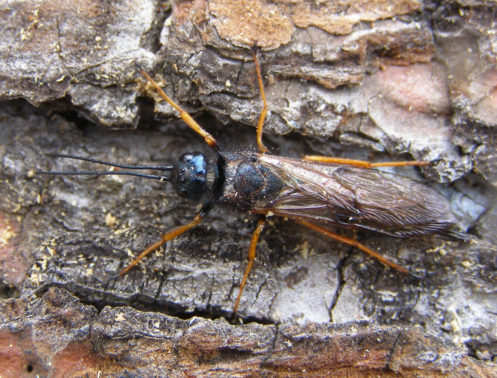 Sirex noctilio F